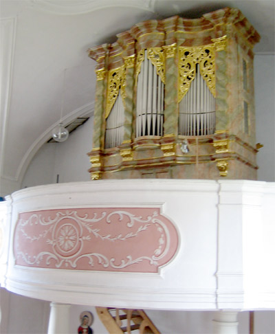 Sankt Johann Orgel